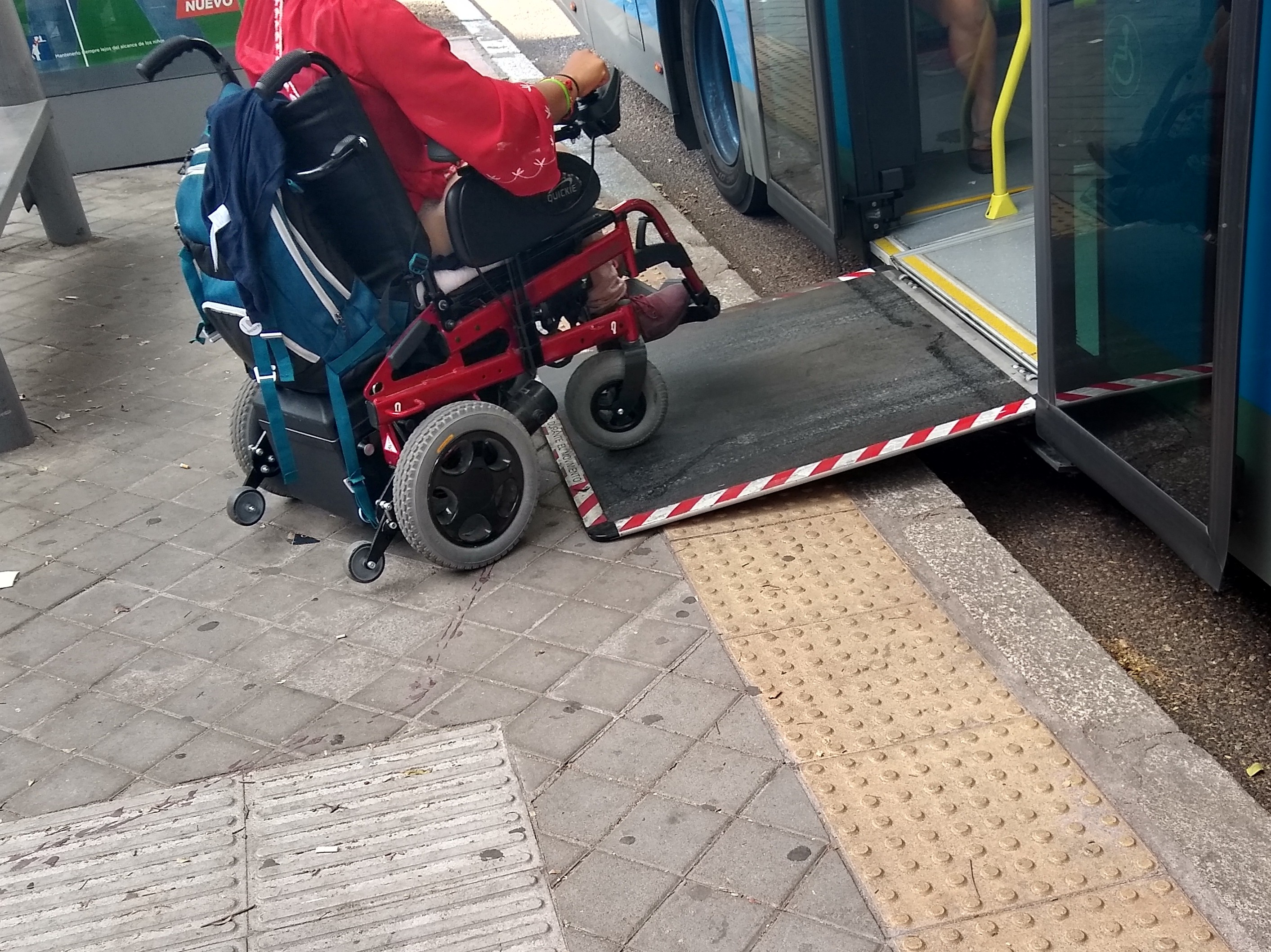 Rampa de un autobús de la EMT Madrid